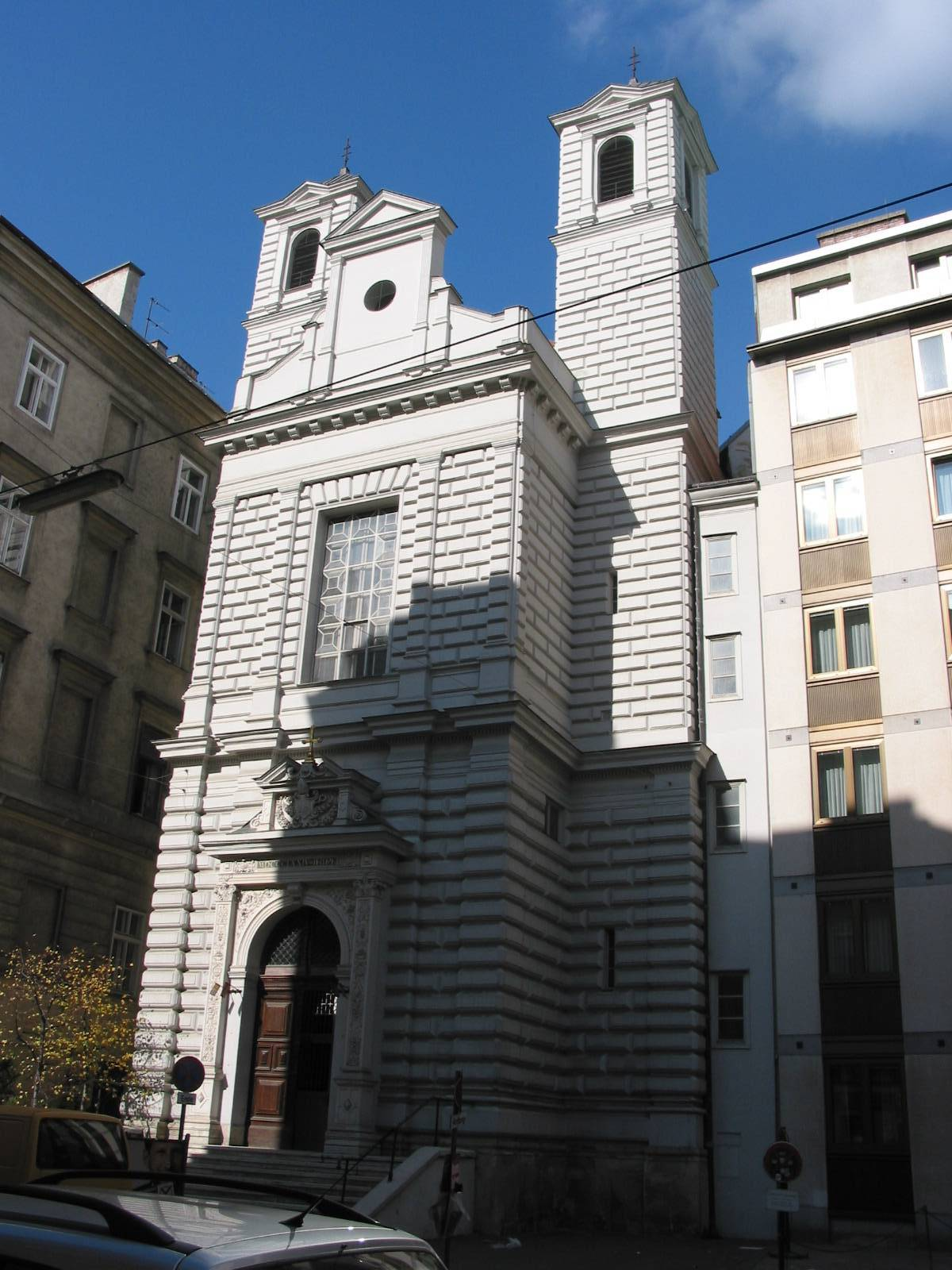 Mechitaristenkirche, Wien